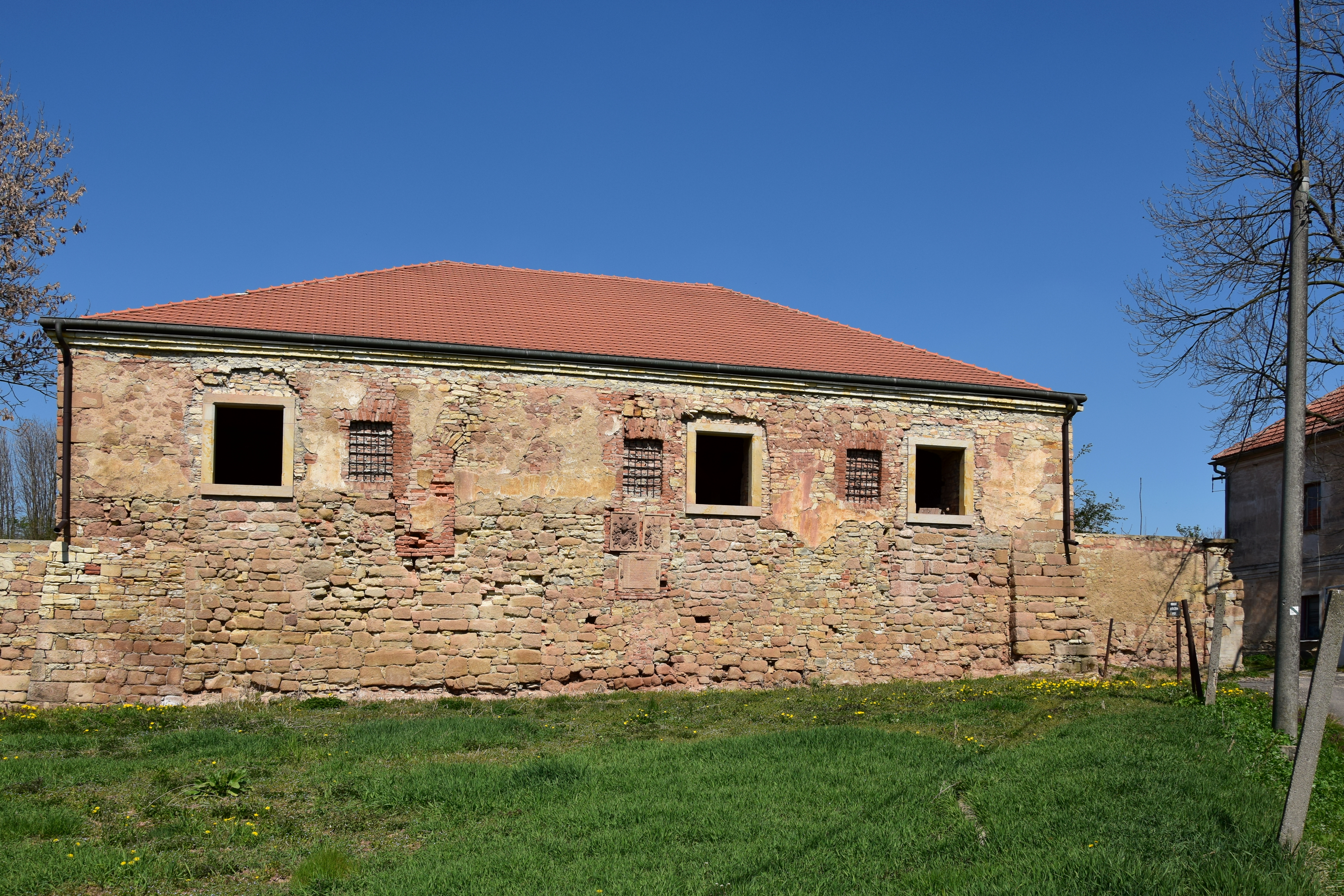 Tvrz Hrádek v Neprobylicích – jižní průčelí